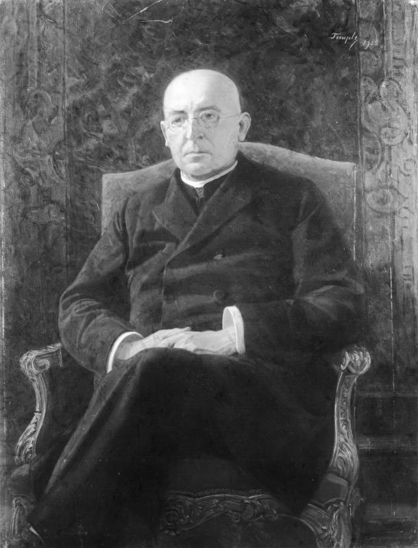 ganze Figur sitzend, leicht von links